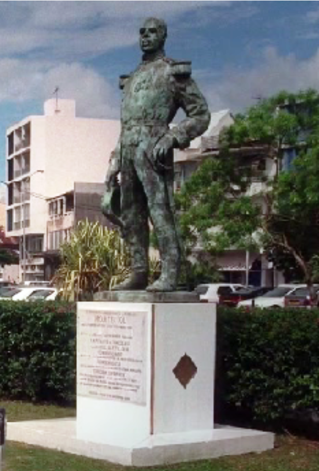 Statue de Sosthène Héliodore Camille Mortenol à Pointe-à-Pitre